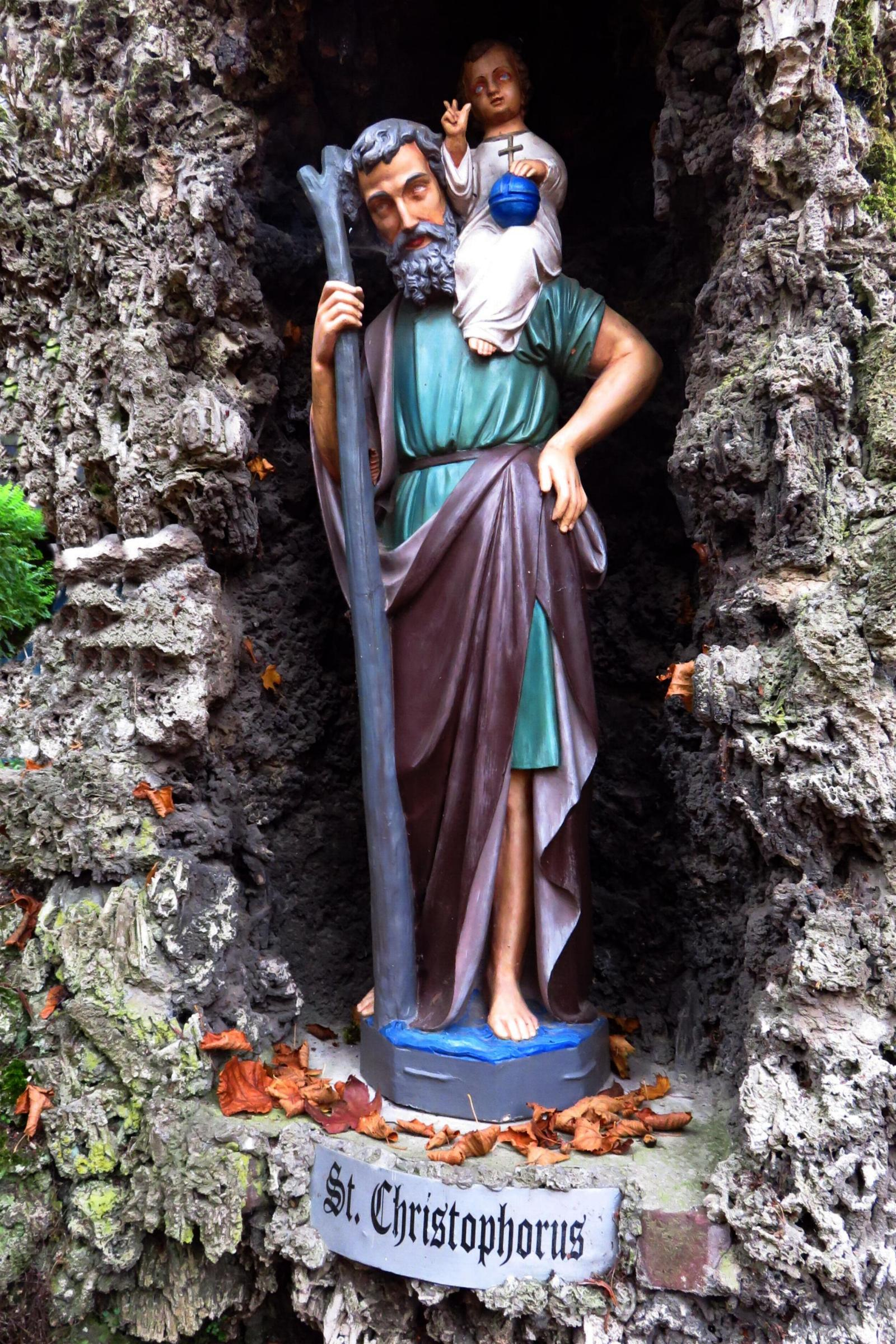 Grottenanlage in Hehn Heiligenpesch